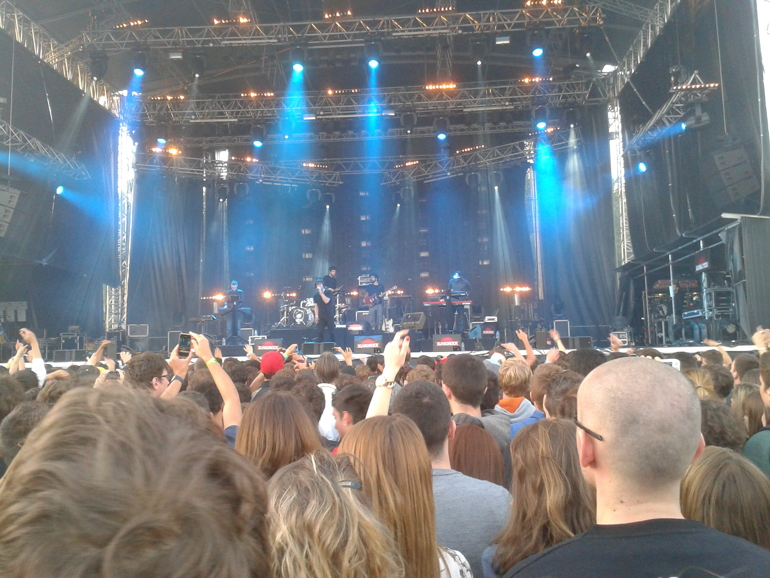 Orelsan le vendredi 8 juin 2012 sur la Scène de la Plaine durant l'édition 2012 de Garorock à Marmande.